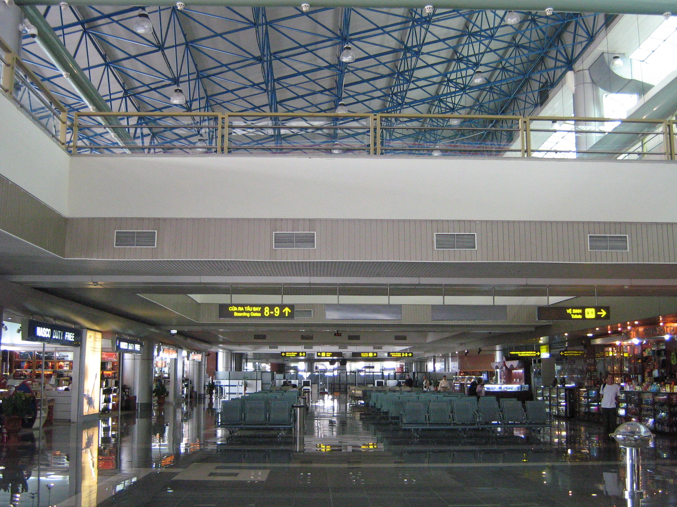 Dach und 3. Ebene in Noibai